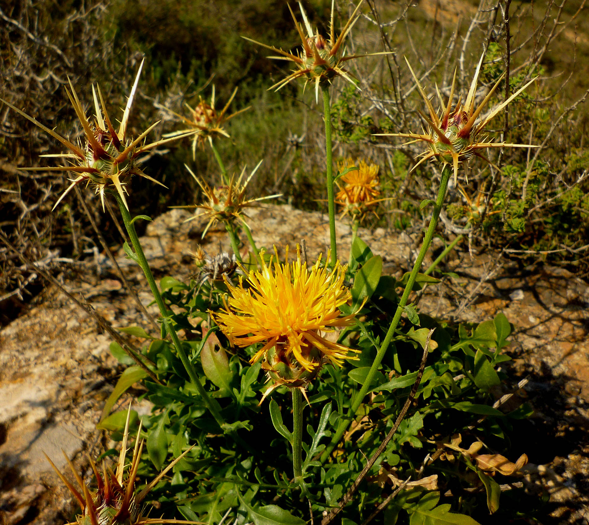 Centaurea saxicola en la Sierra de la Muela de Cartagena, España.